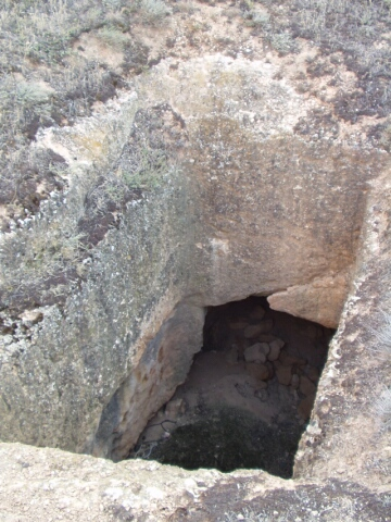 Boca del paso subterraneo en el Castillo de la Raya-Monteagudo de las Vicarías